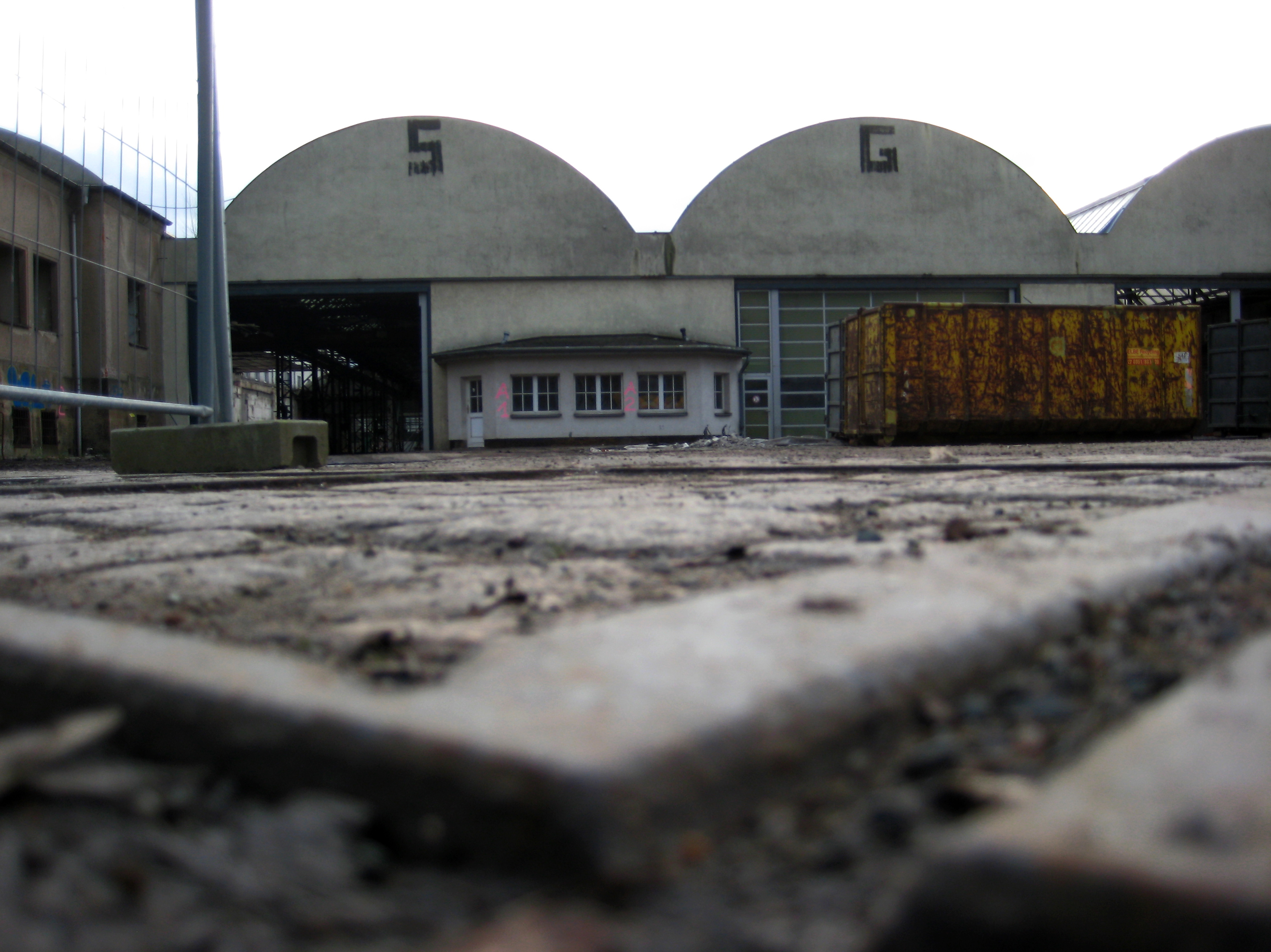 Betriebshof Tolkewitz Dresden; Der Abriss hat begonnen; - 2016